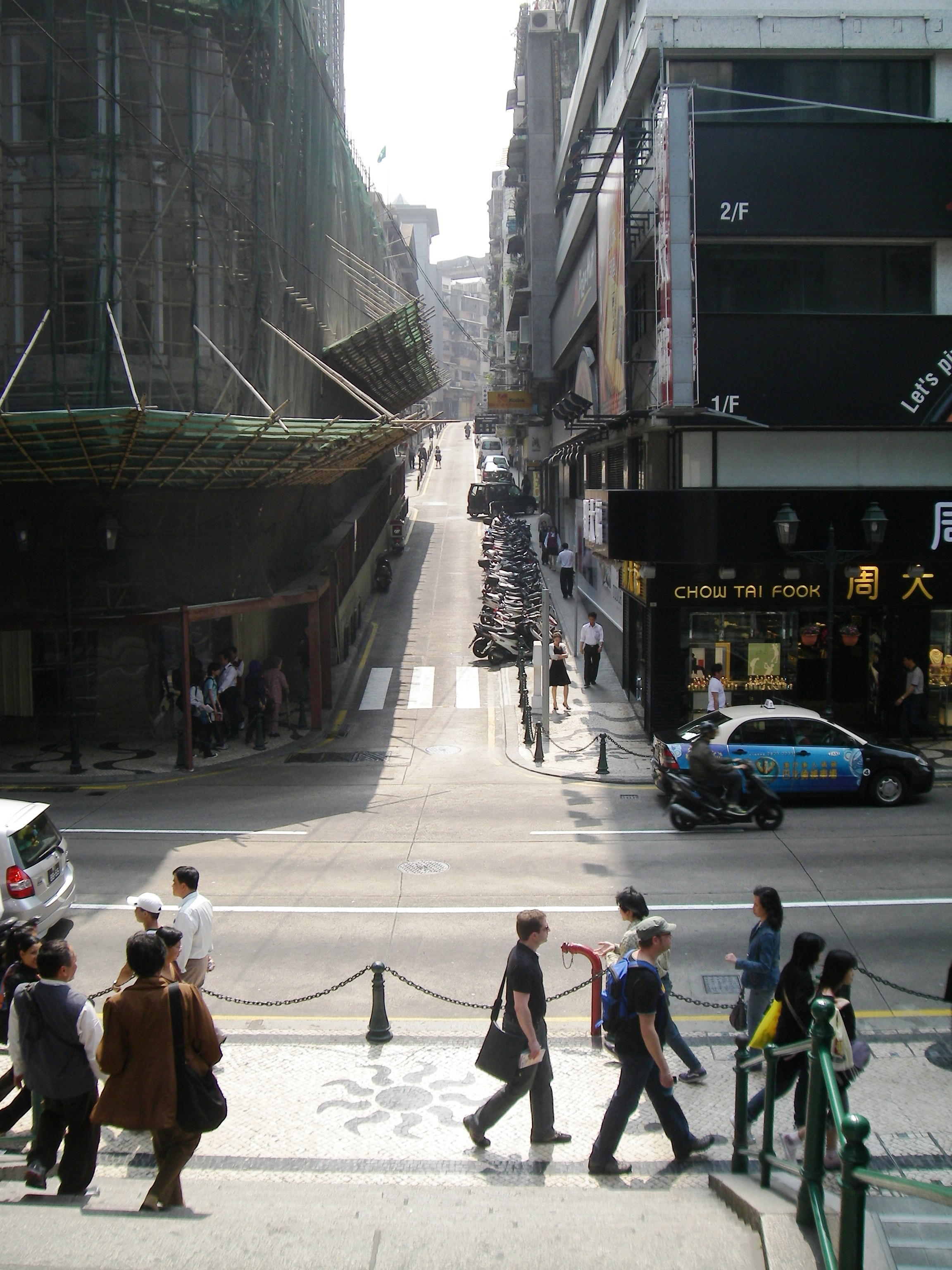 Rua Central from Rua da Se Macau